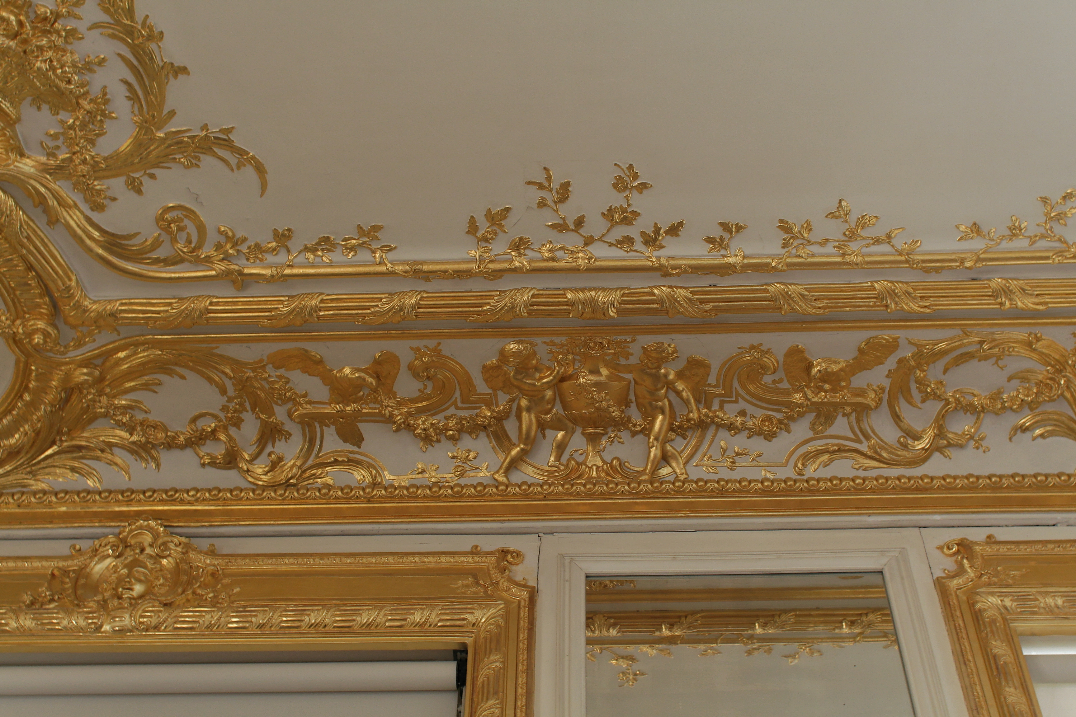 Château de Versailles, appartement du Dauphin, grand cabinet du Dauphin. Corniche dorée.